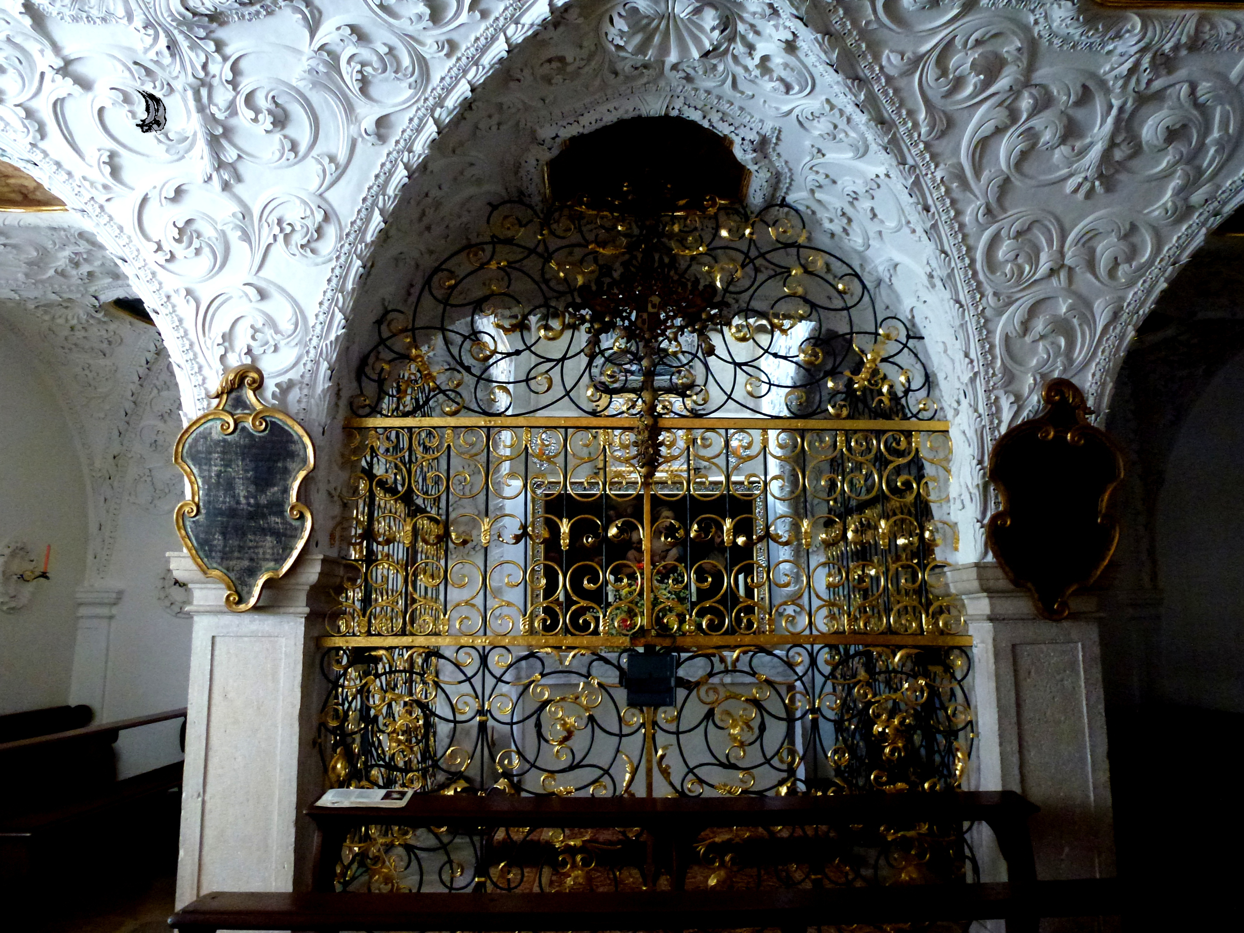 Kypta mit Reliquien der Hl.Walburga In der Klosterkirche St.Walburga in Eichstätt